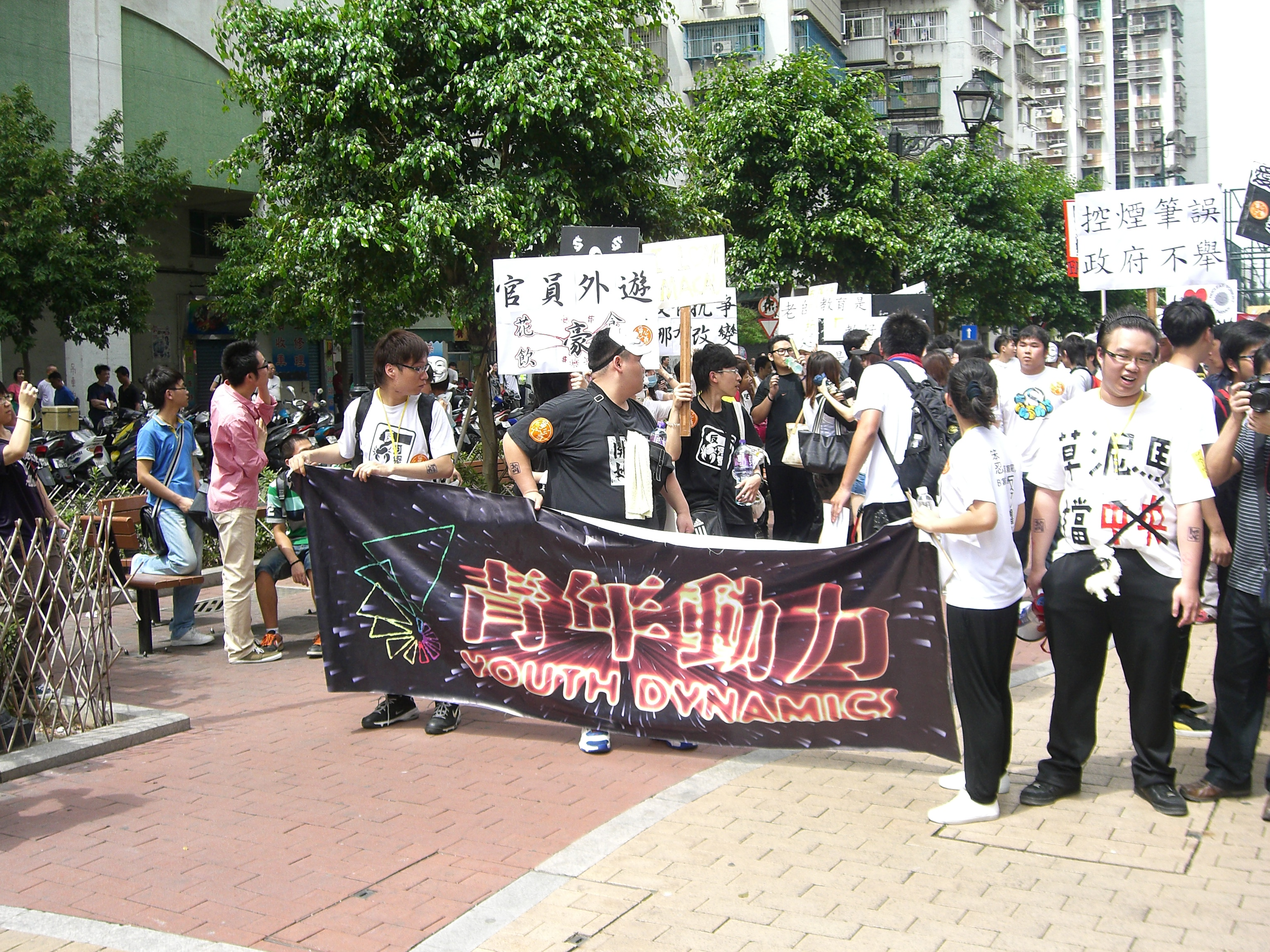 2011年澳門勞動節遊行